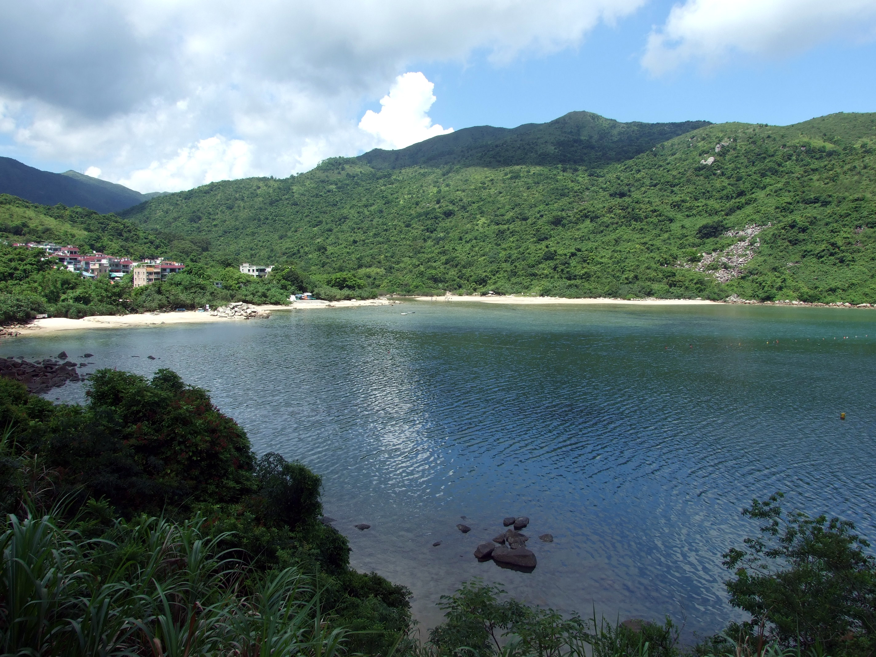 中文（香港）: 海下灣